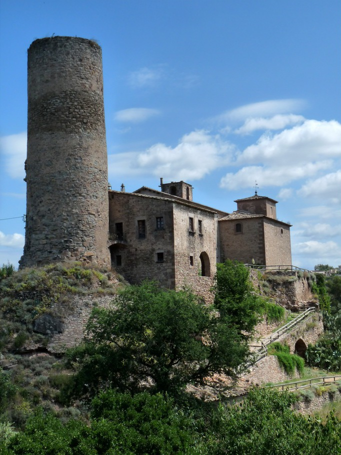 Vista general de Sant Vicenç de Fal , la rectoria i una de les torres del castell